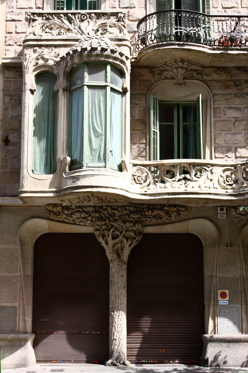 Casa Antonia Burés, obra modernista signada per Juli Batllevell, si bé s'atribueix al constructor Joan Pi. Construïda entre 1903-1906.